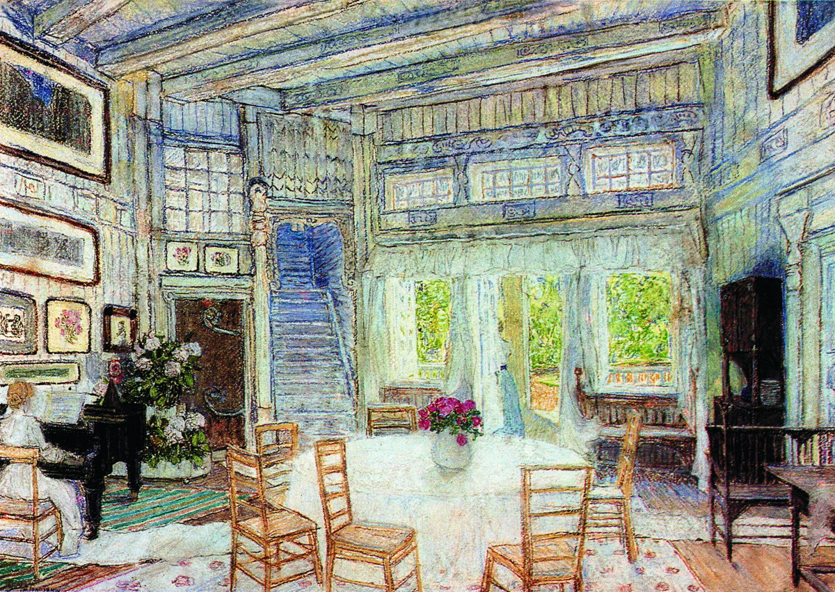 Столовая в доме доктора Вангеля. 1905 Эскиз декорации к драме Г. Ибсена "Дочь моря" Государственный центральный театральный музей им. А.А.Бахрушина